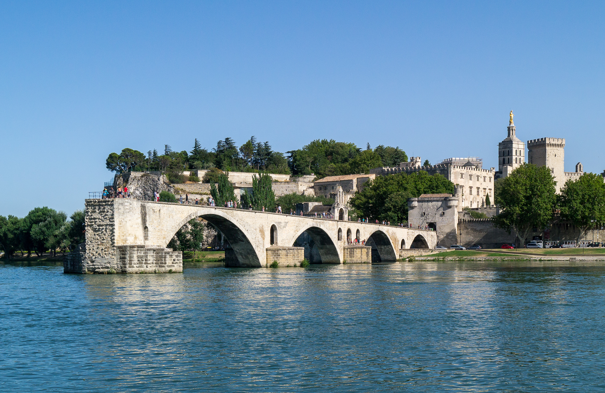 St Benezet bridge / Avignon, France